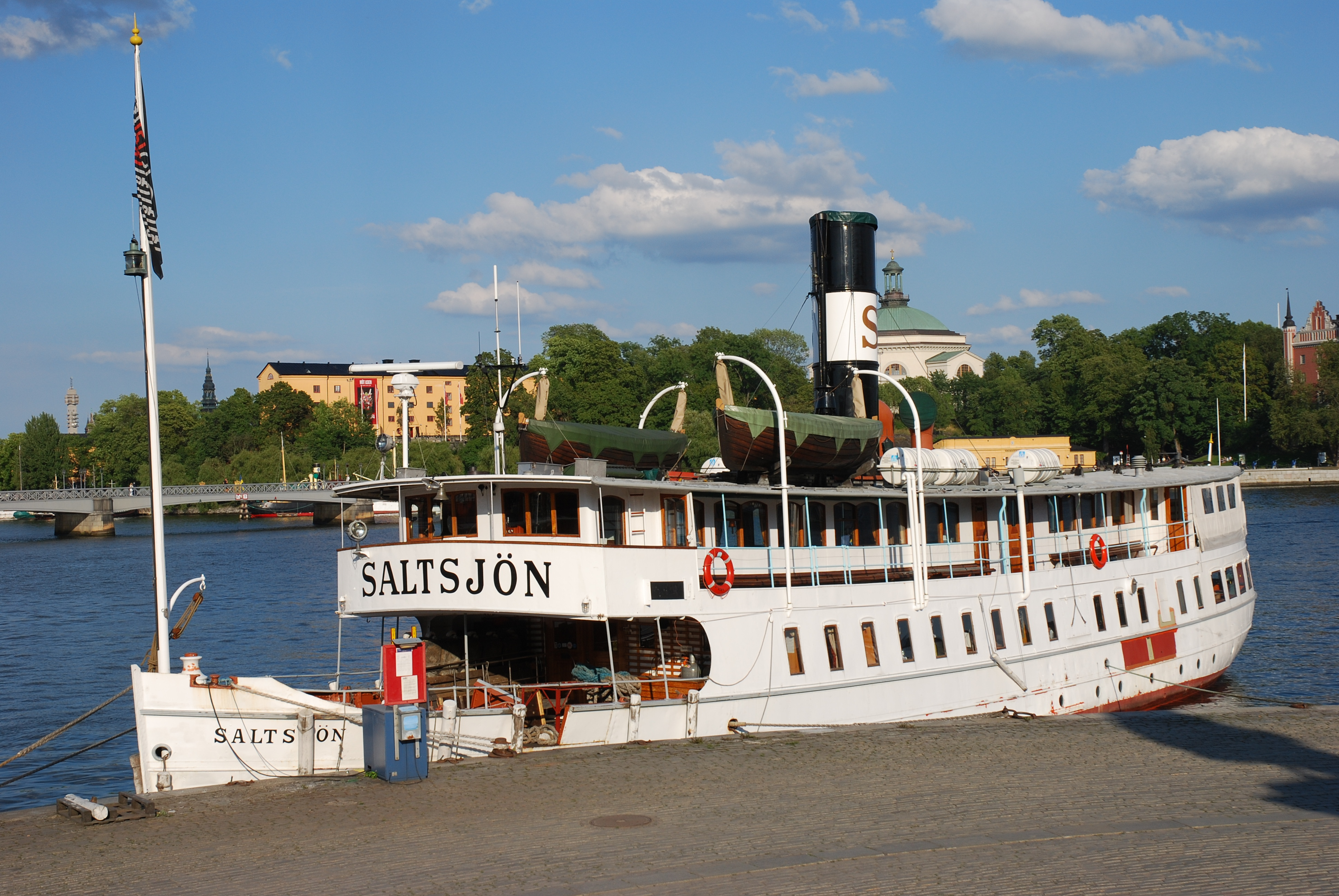 S/S Saltsjön moored at Skeppsbron in Stockholm